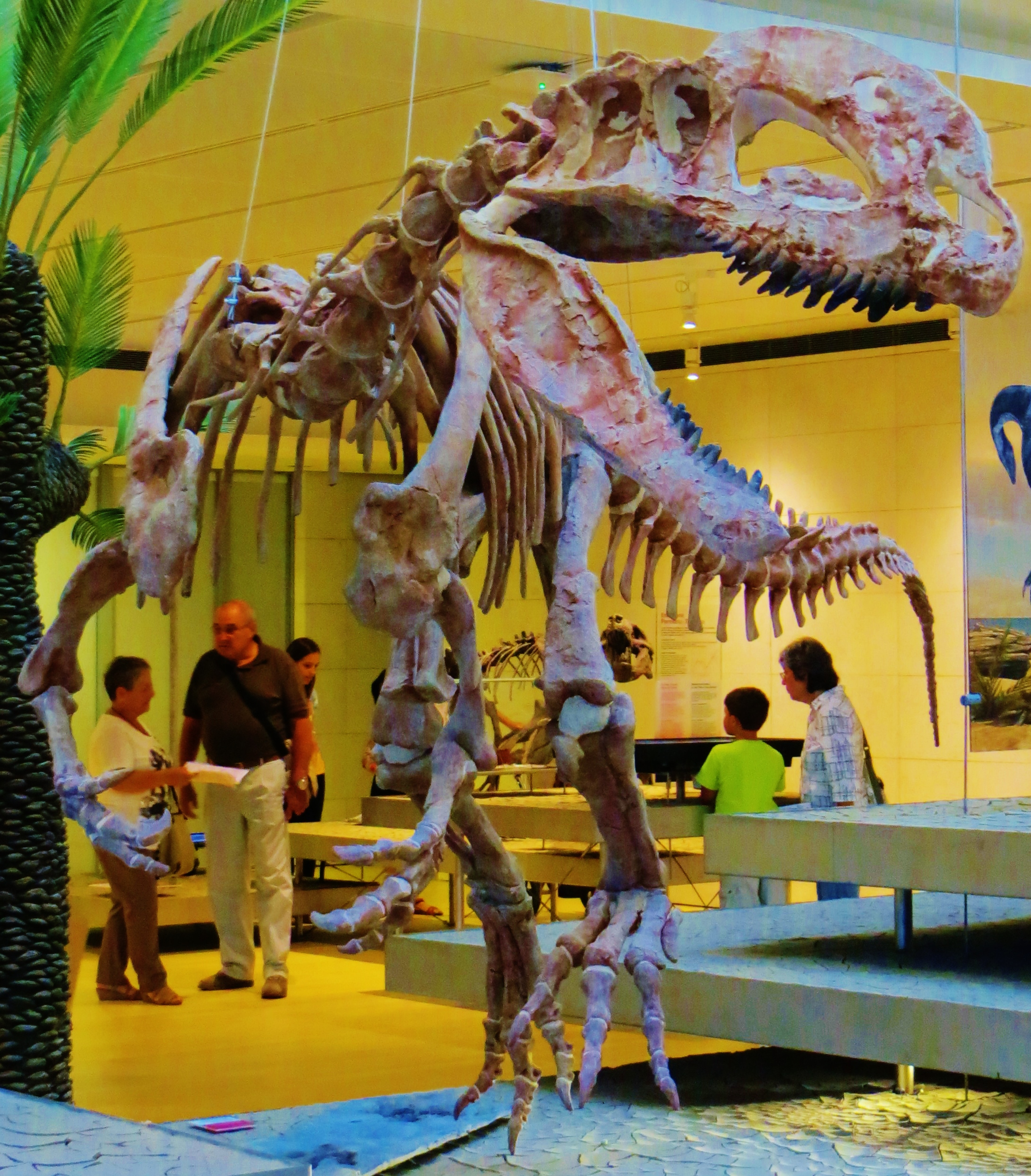 Fossil of Sinosaurus, an extinct reptile- Took the picture at Muse (Trento)